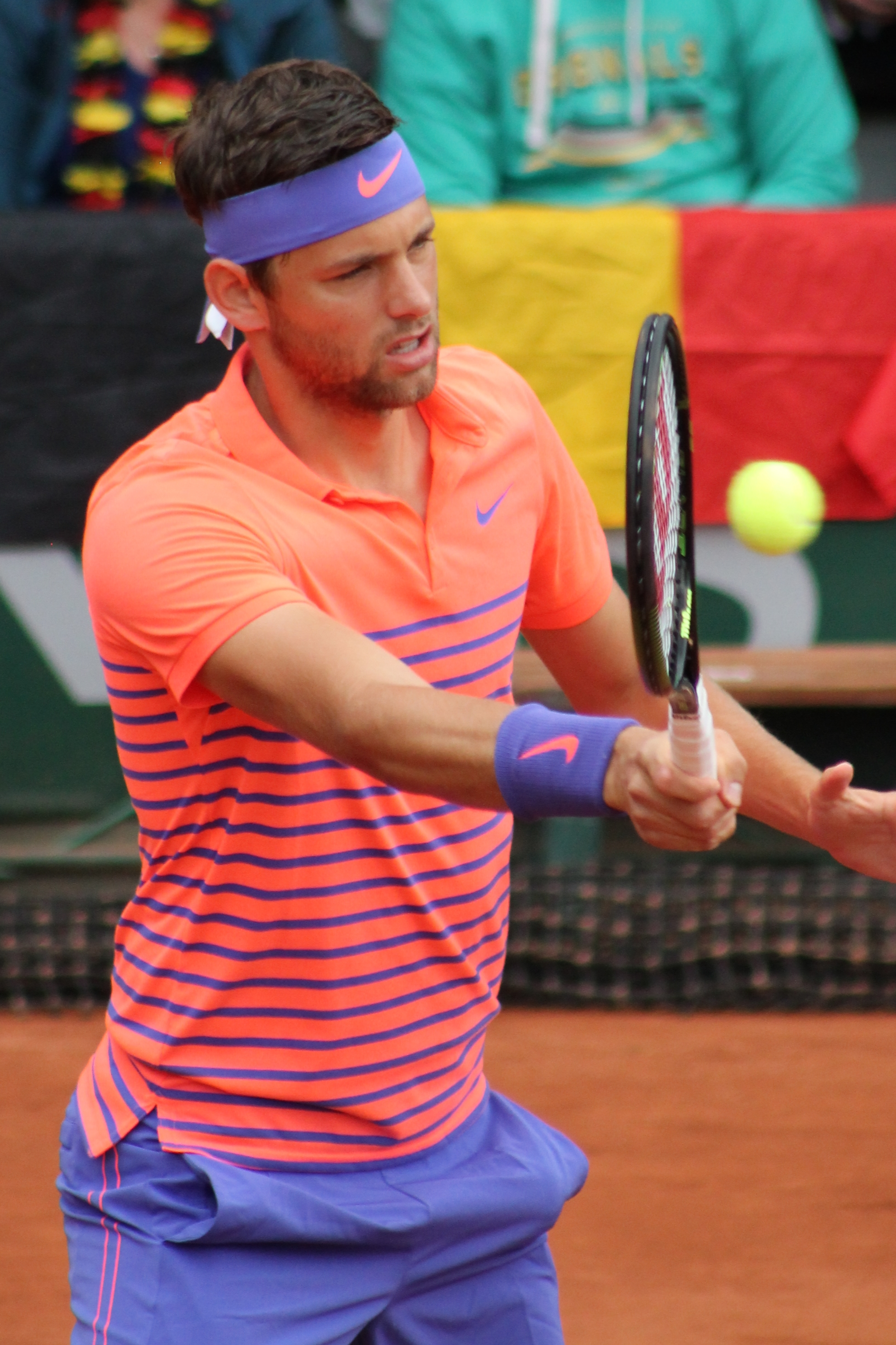 Krajinovic RG15 (9)